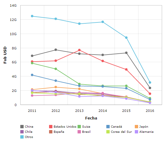 Exportaciones de Perú del periodo 2011-mayo 2016 expresadas en USD valor FOB